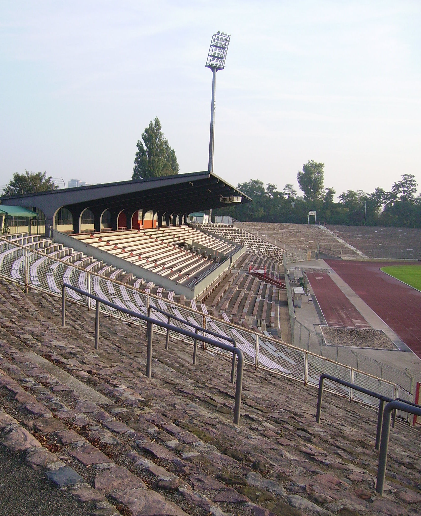 Südwest-Stadion of Ludwigshafen in Rhineland-Palatinate (Germany)